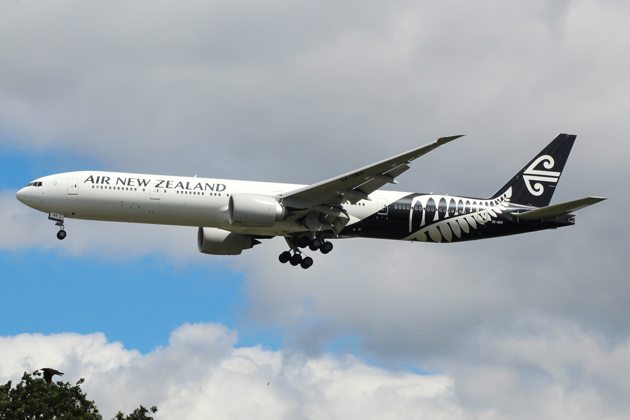 ZK-OKR Boeing 777 Air New Zealand